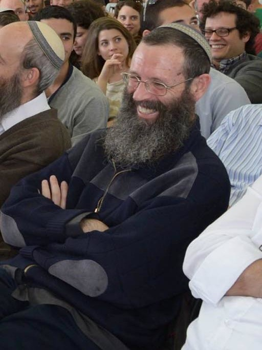 ראובן ריבלין נשיא מדינת ישראל בביקור במכינה הקדם צבאית בני דוד בעלי, בביקור נפגש עם ראשי המכינה ביניהם יגאל לווינשטין ועם כ-400 תלמידי הישיבה לשיחה פתוחה